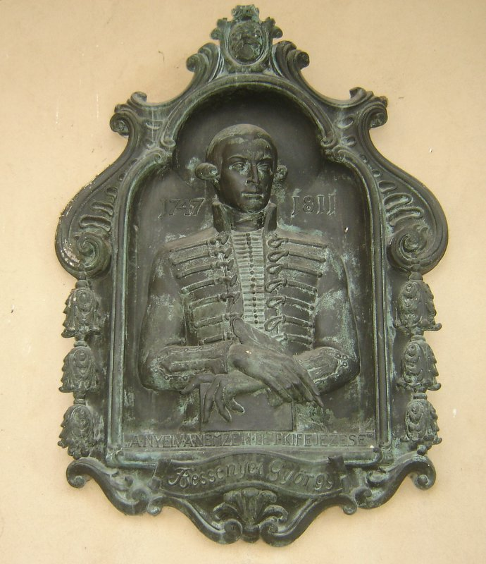 Bessenyei György domborműve a szegedi Nemzeti Emlékcsarnokban a Dóm tér déli oldalán A dombormű Mátrai Lajos alkotása Újfalusi Németh Jenő felvétele